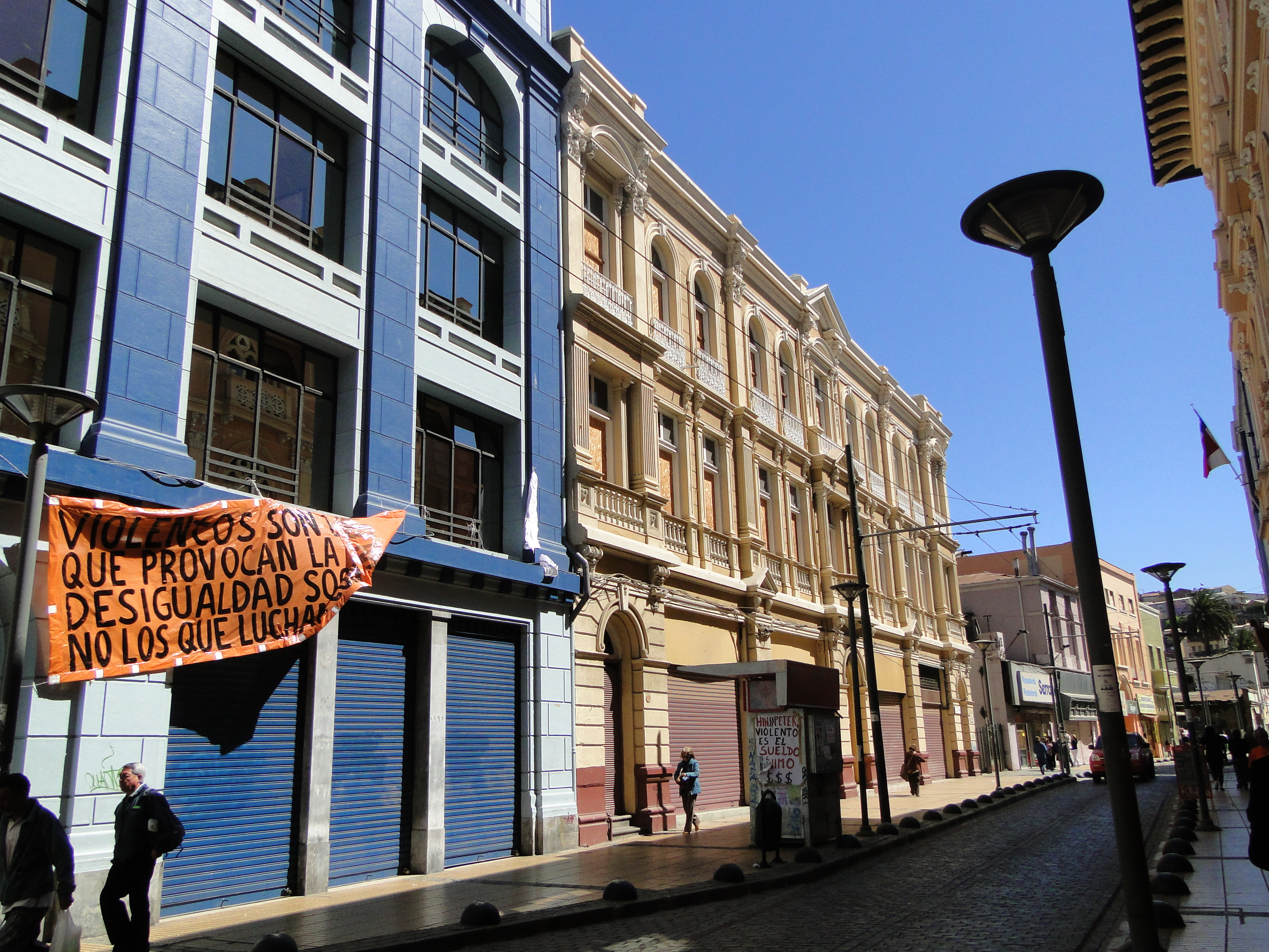 Sector Plaza Echaurren y calle Serrano This is a photo of a national monument in Chile: 472